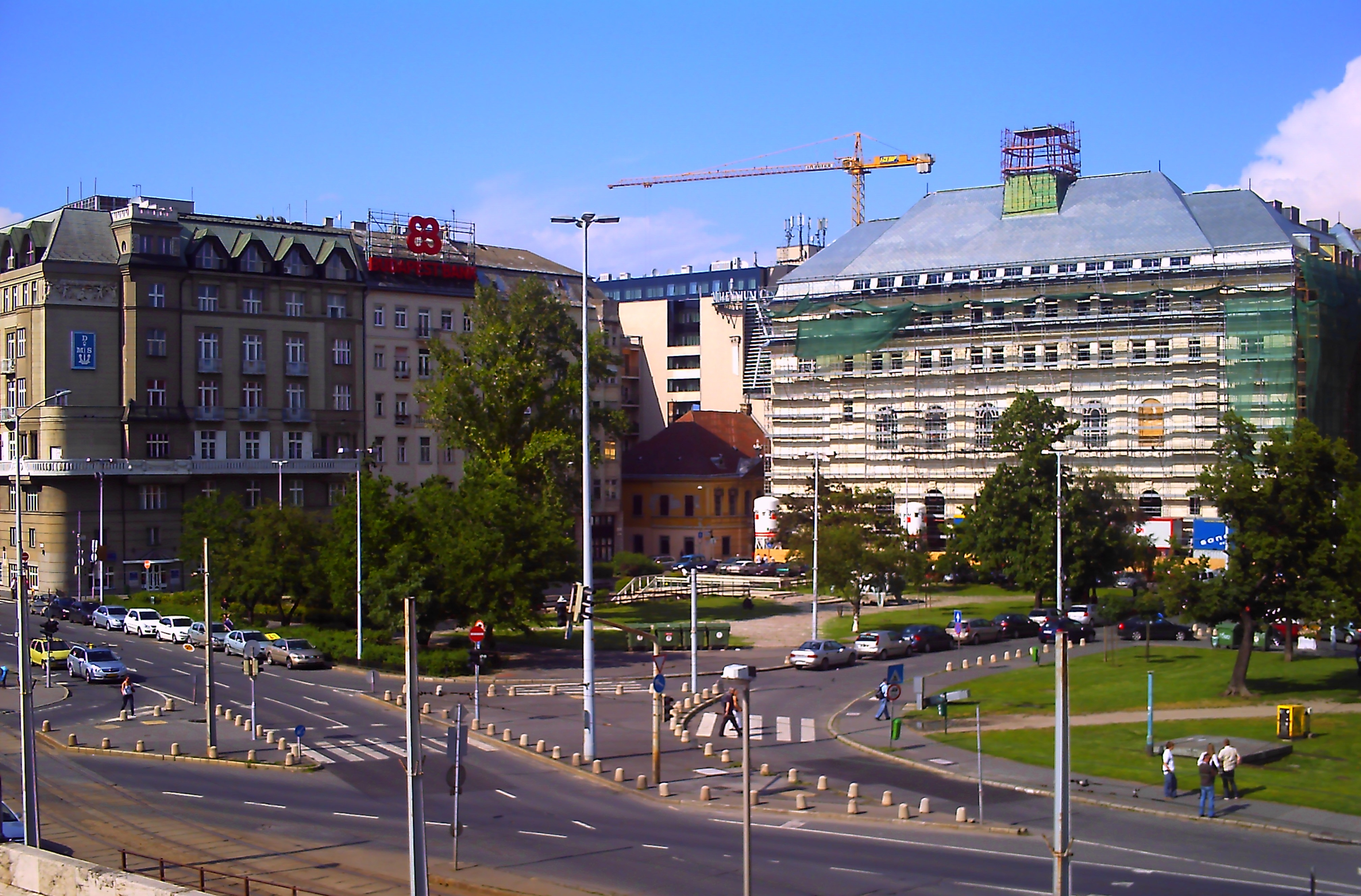 Contra-Aquincum romjai a mai Március 15. téren 2010 májusában